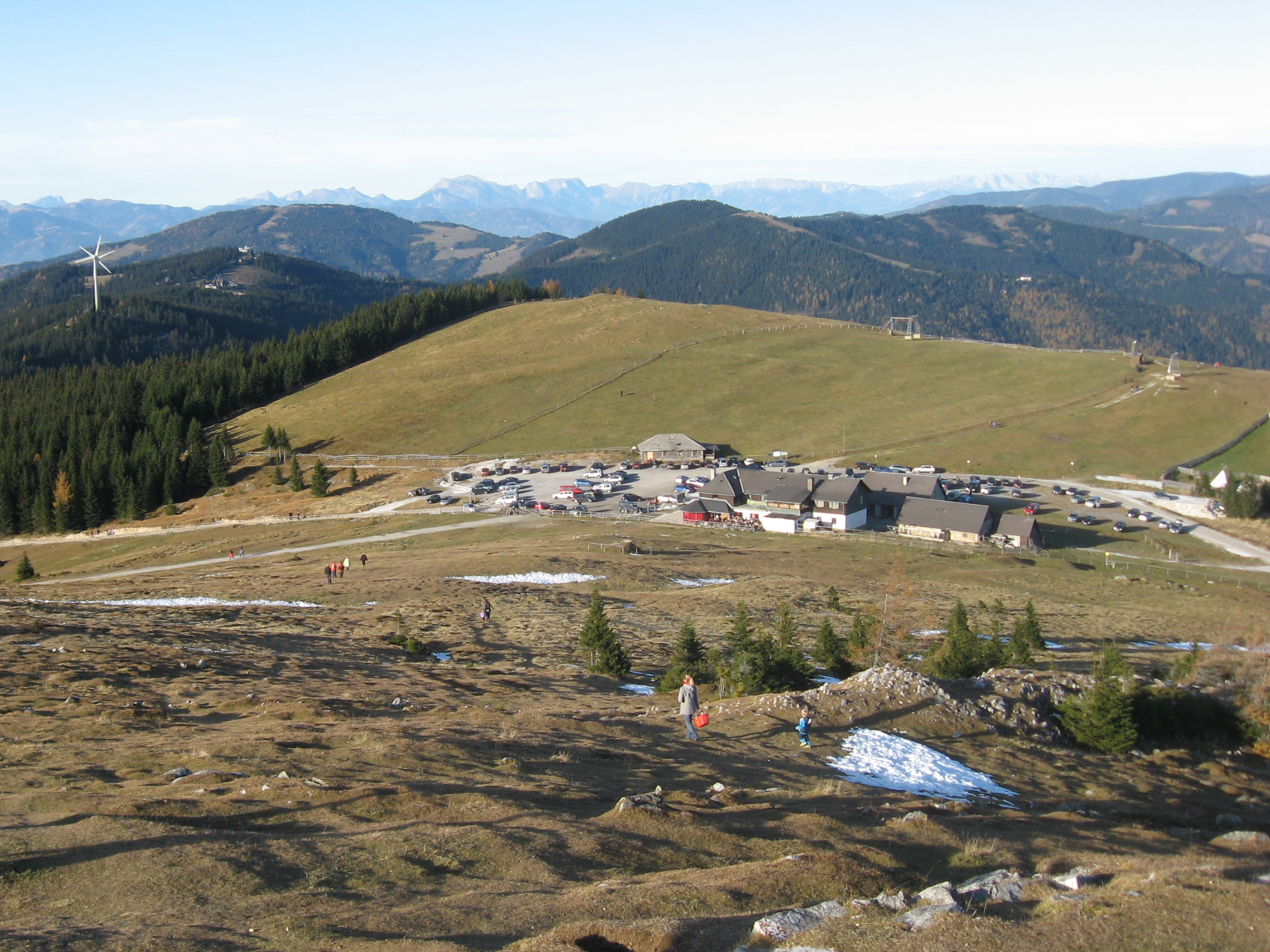 Blick vom Wölkerkogel über das Alte Almhaus nach Norden